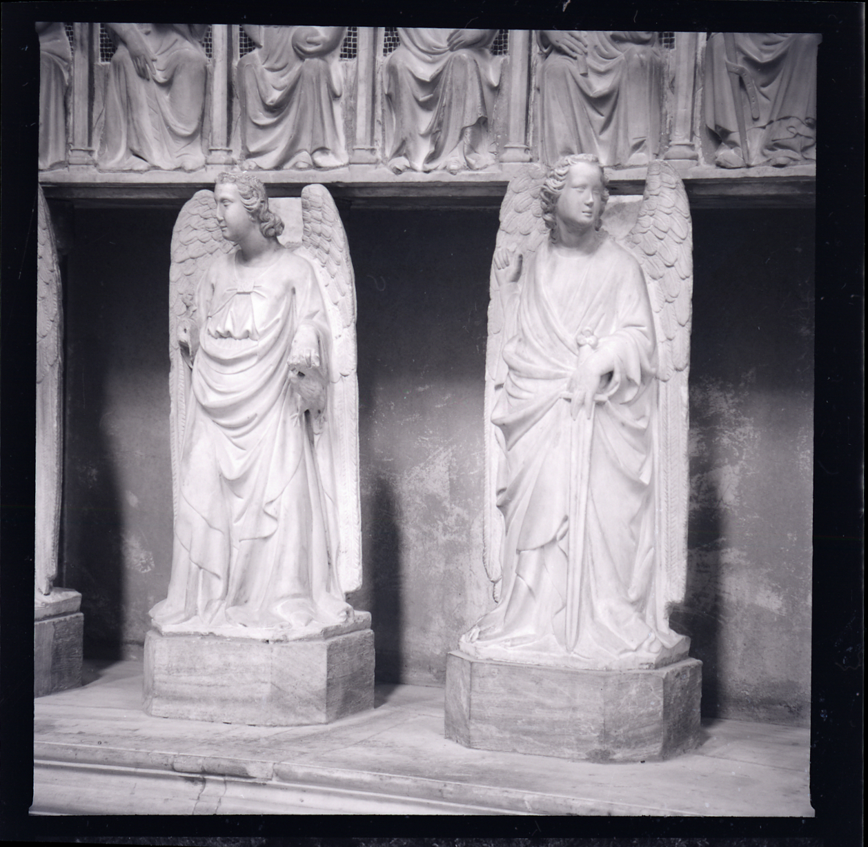 Servizio fotografico : Napoli, 1965 / Paolo Monti. - Buste: 10, Fototipi: 10 : Negativo b/n, gelatina bromuro d'argento/ pellicola ; 6x6. - ((Serie costituita da 10 negativi identificati con i nn.: 11501-11508. Sulle buste iscrizioni manoscritte. La suddetta serie è contenuta nella scatola identificata con la numerazione G11501-12000. - Occasione: Documentazione per la pubblicazione: "Emilio CECCHI, Natalino SAPEGNO (a cura di), Storia della Letteratura Italiana, 9 voll., Milano, Garzanti, 1966 e segg.". - Fonte: Agenda di Paolo Monti: Monti/ 2/ 6 giugno 1964 - 31 marzo 1966/ 8194-12420 (1964-1966), presso Archivio Paolo Monti